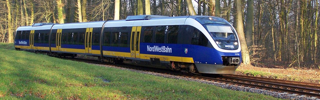 VT 716 der FVE bei der Einfahrt in die Haltestelle "Klinikum Bremen-Nord"